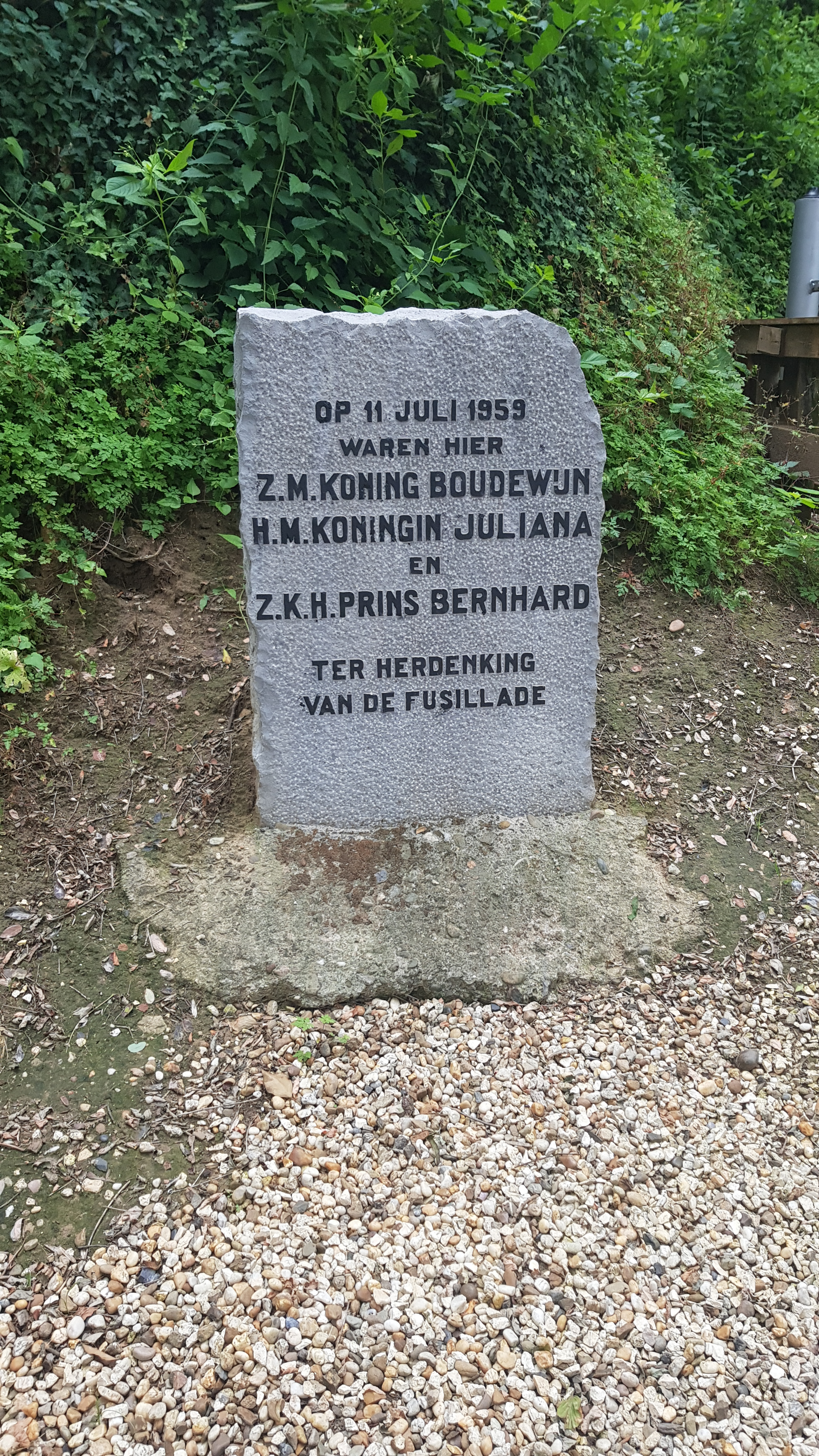 Vlaams monument, Cadier en Keer, Nederland